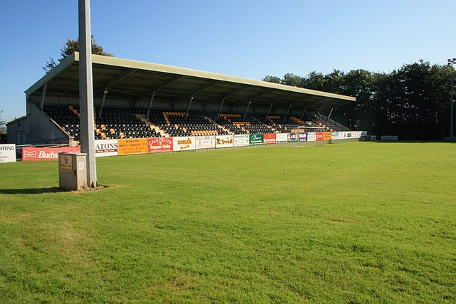 Kilkenny City AFC